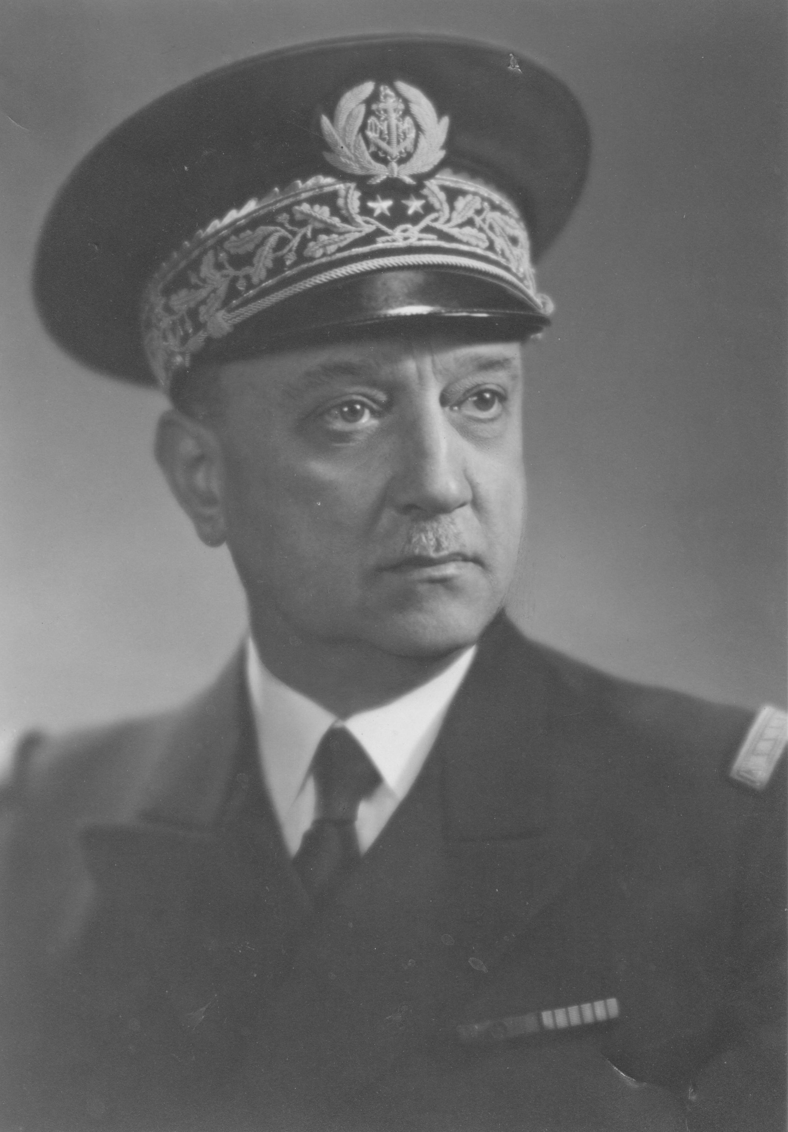 Photo de l'Amiral Henri BLEHAUT